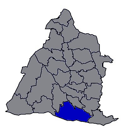 臺灣省彰化縣溪洲鄉。